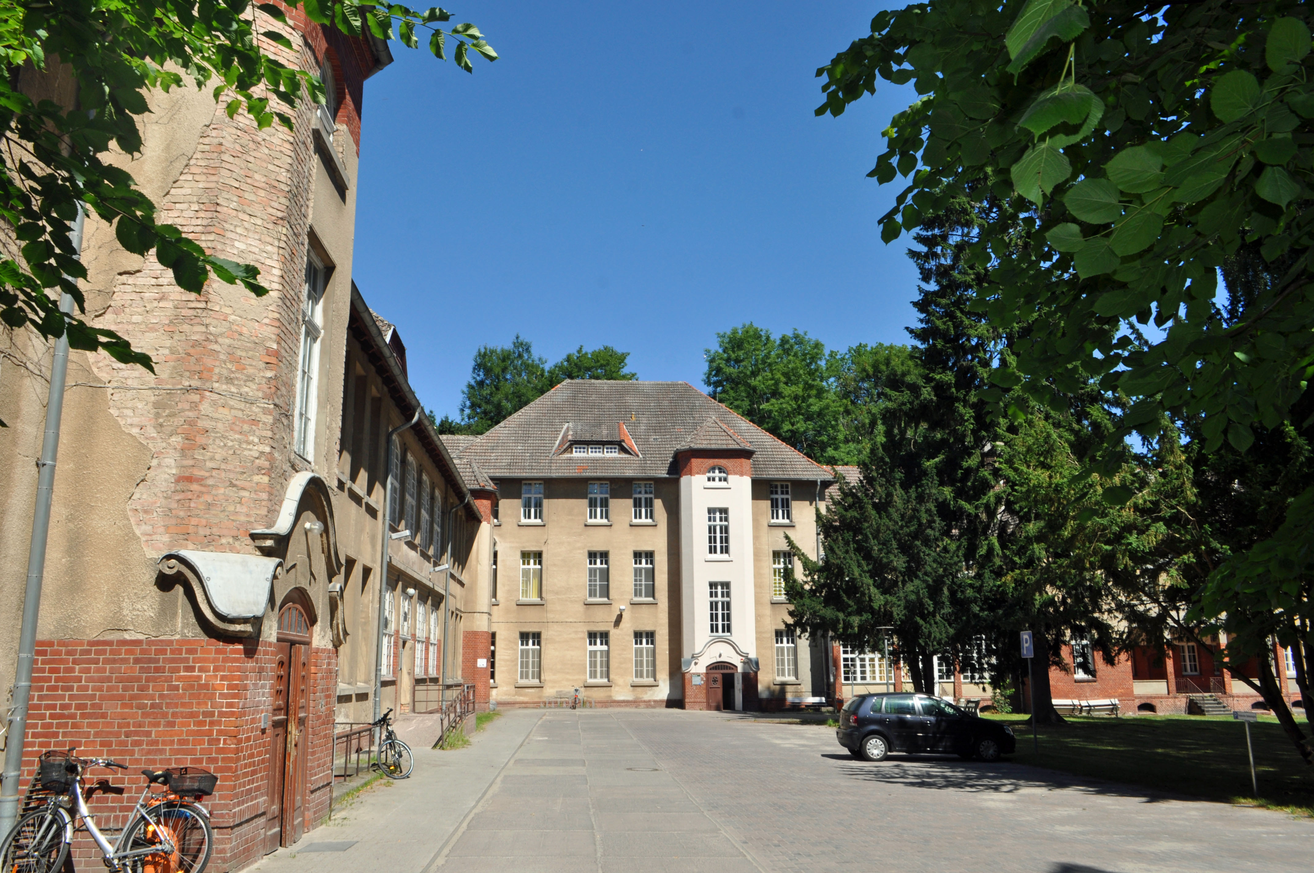 Auf dem Gelände des Krankenhauses "West" (HELIOS Hanseklinikum, West, Rostocker Chaussee 70, in Stralsund). Haus Nr. ??